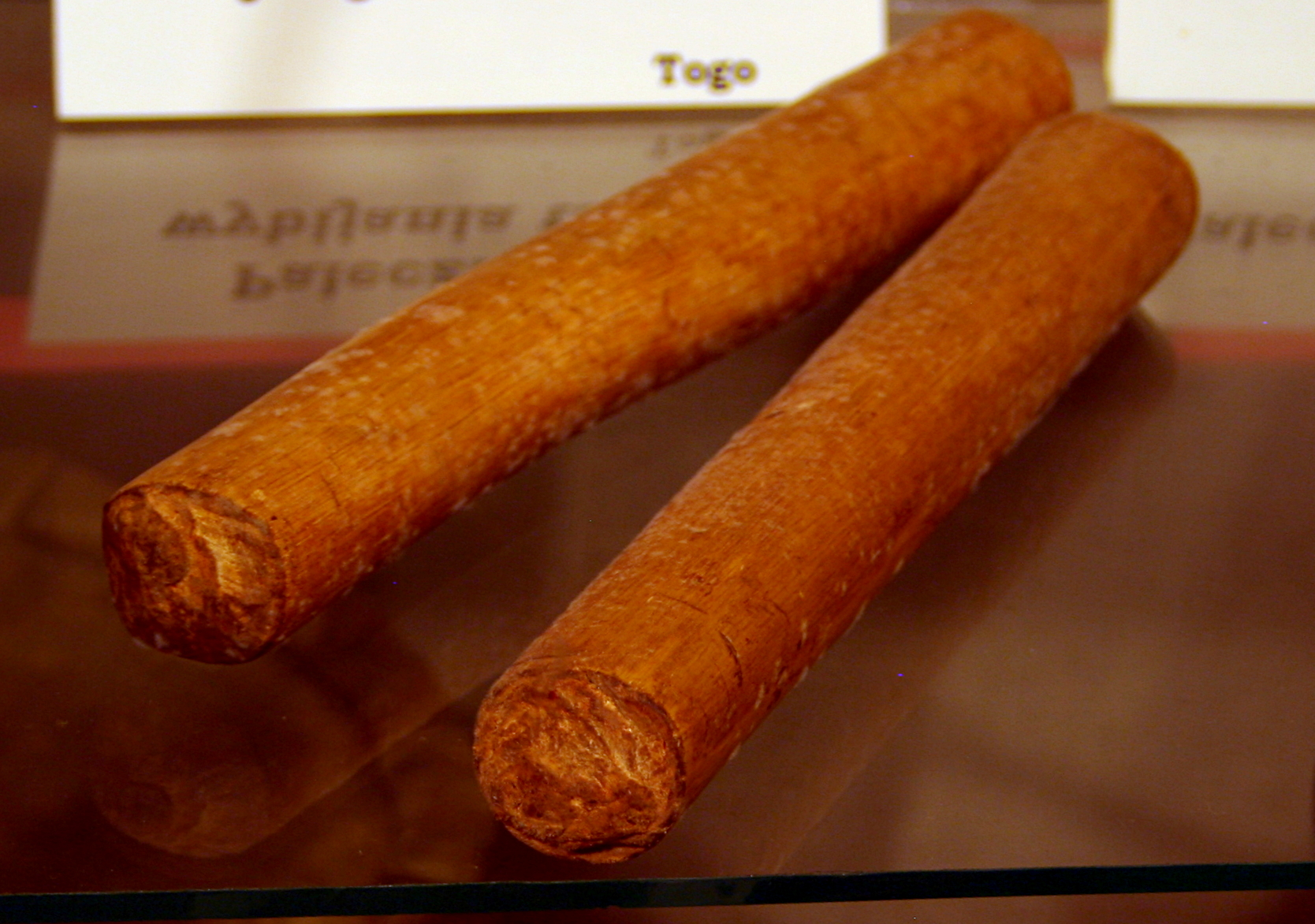 Pałeczki do wybijania taktu (rytmu) w Muzeum Misyjno-Etnograficznym w Pieniężnie